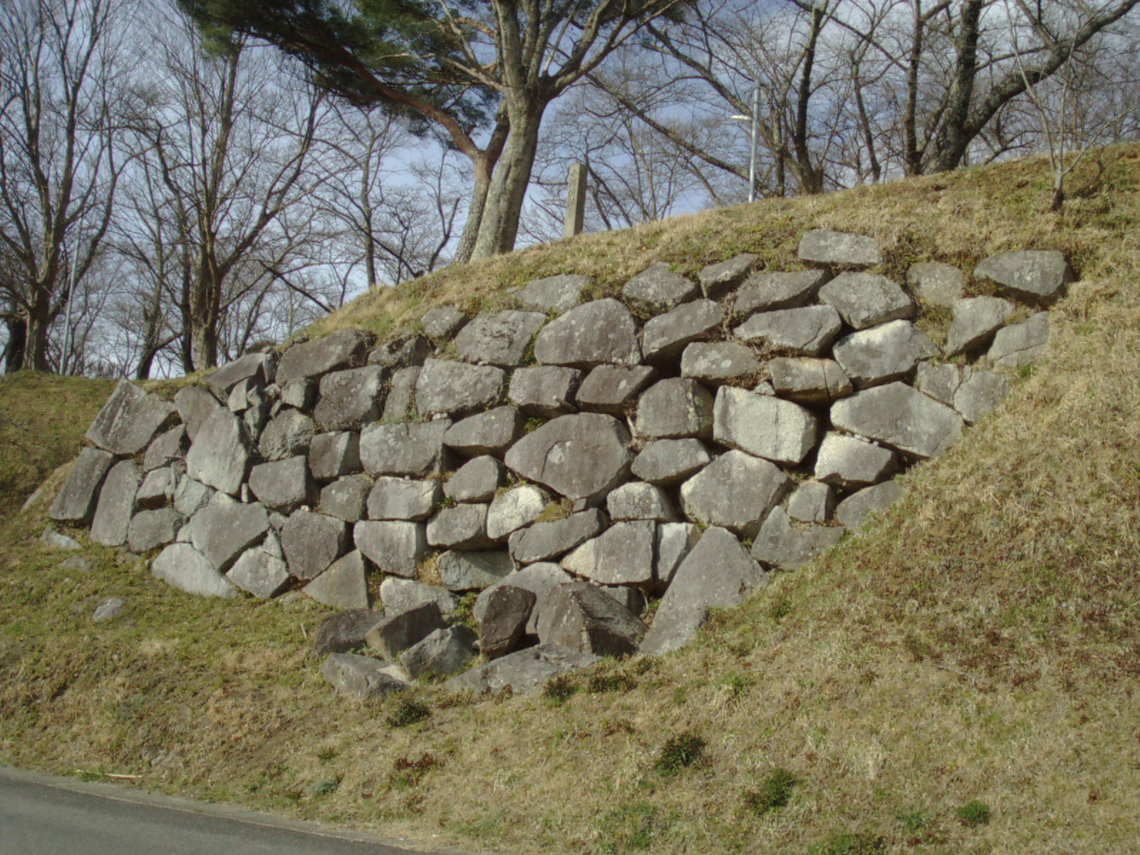 34d